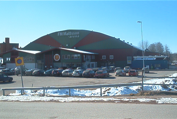 Bild på FM Mattsson Arena utifrån.